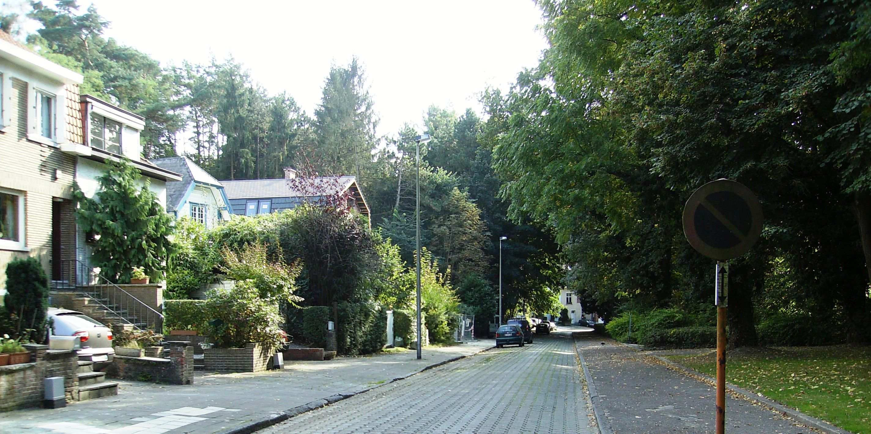 avenue du Grand Forestier Auderghem